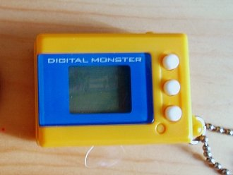 迷你暴龍機的樣子